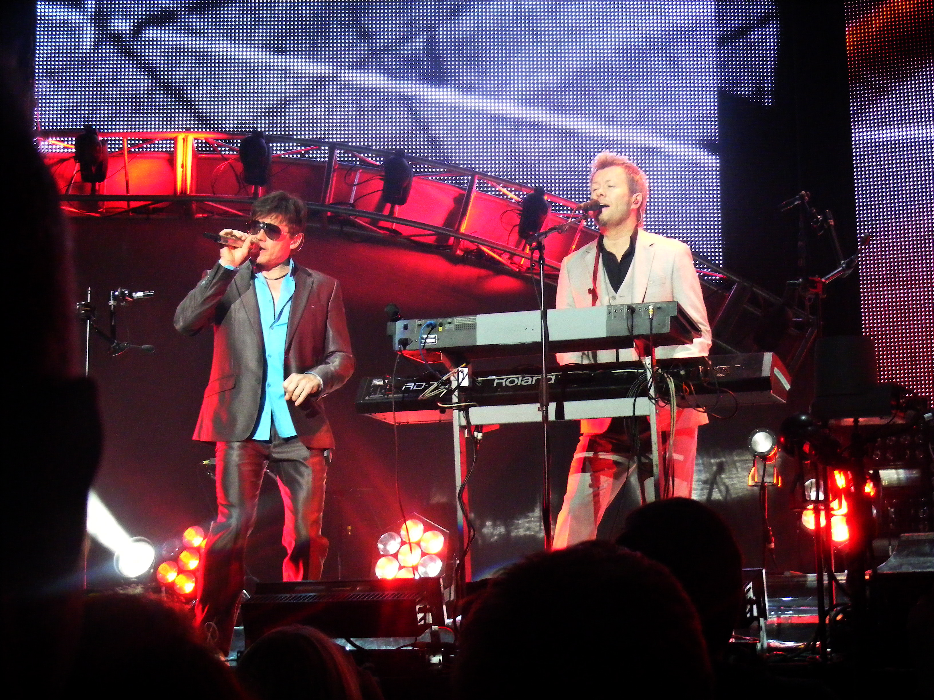 Morten Harket and Magne Furuholmen